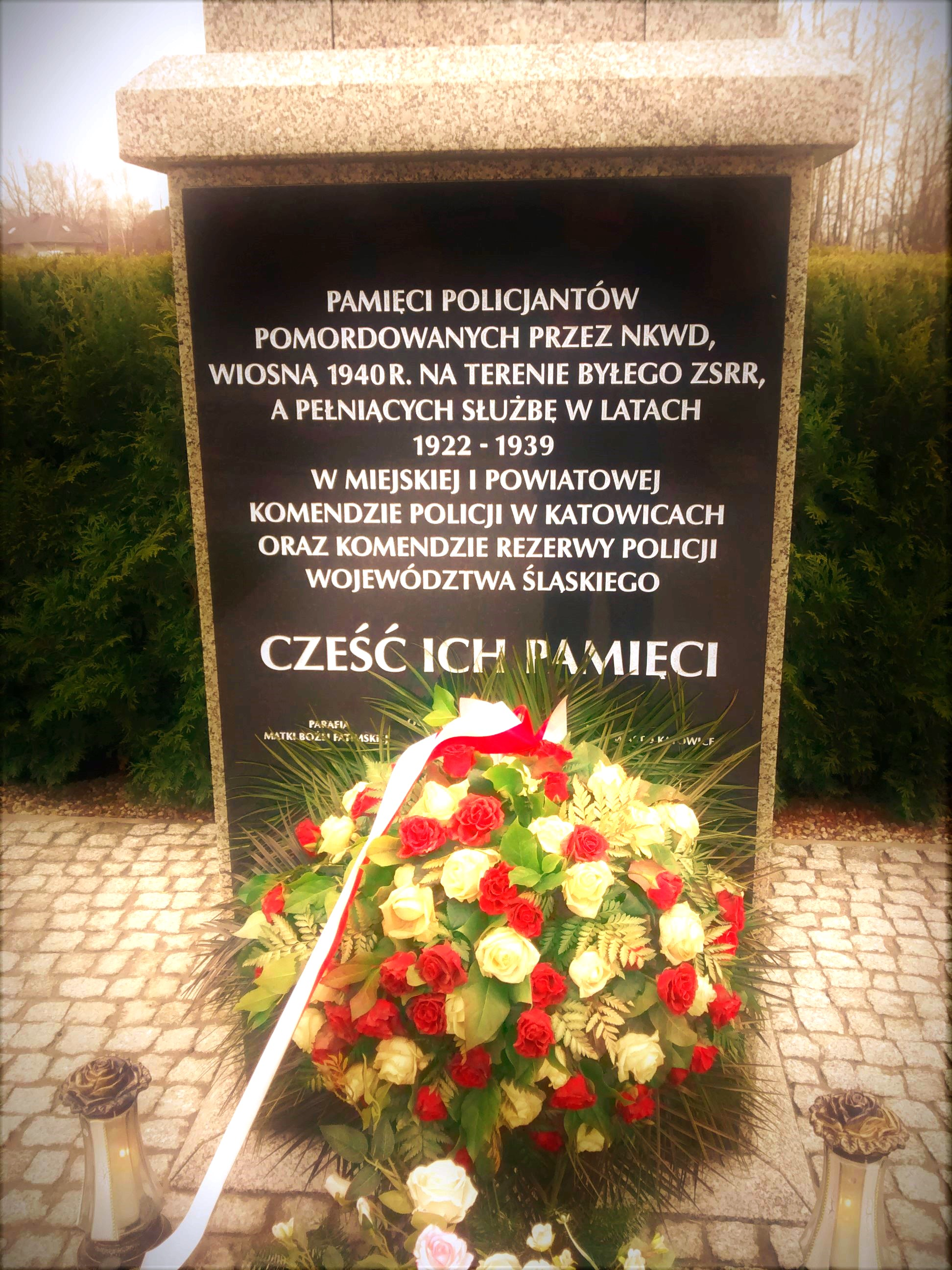 Krzyż z tablicą przy kościele pw. Matki Boskiej Fatimskiej w Katowicach-Piotrowicach (ul. Bukszpanowa)